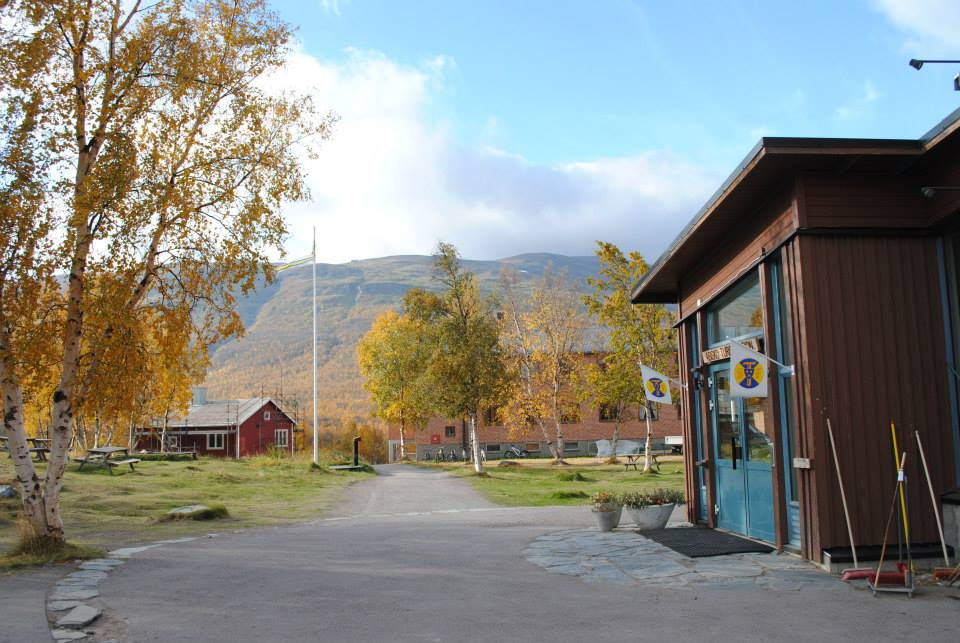 STF turiststation Abisko. I bakgrunden berget Njulla